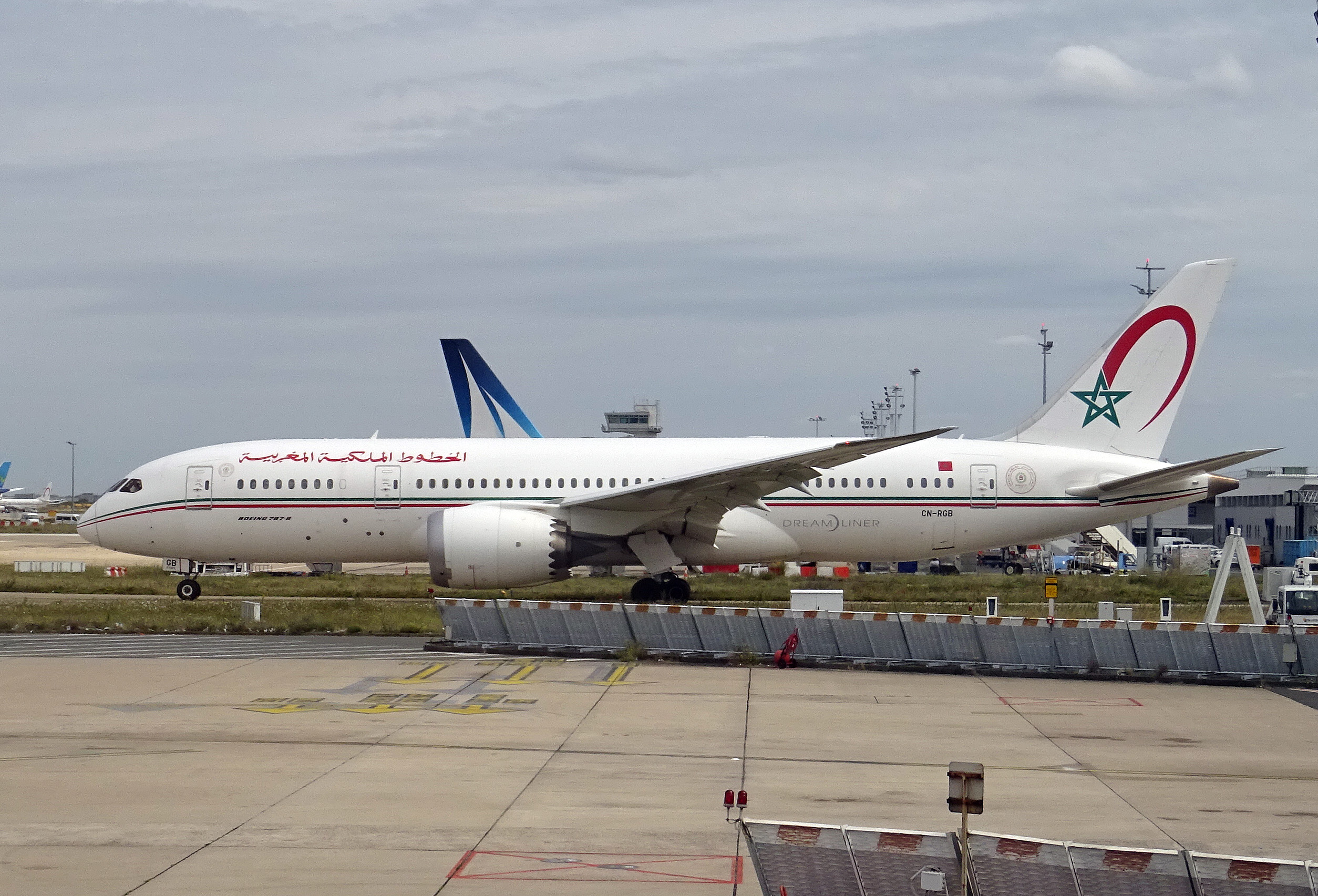 MSN 43817 LN 248 B787-8 / 787 / 787-8 RAM ROYAL AIR MAROC ORY AIRPORT